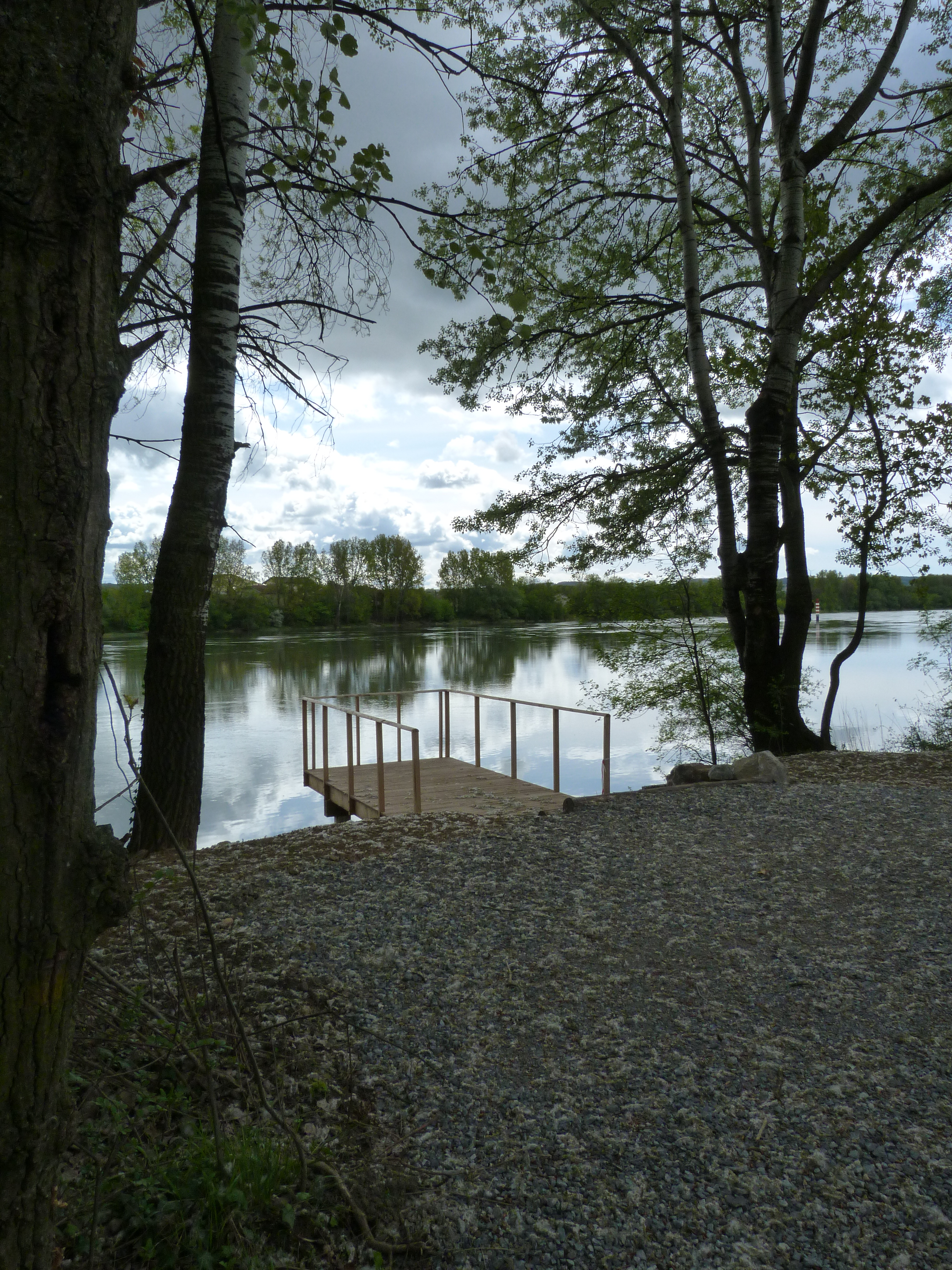 une vue imprenable sur le rhône